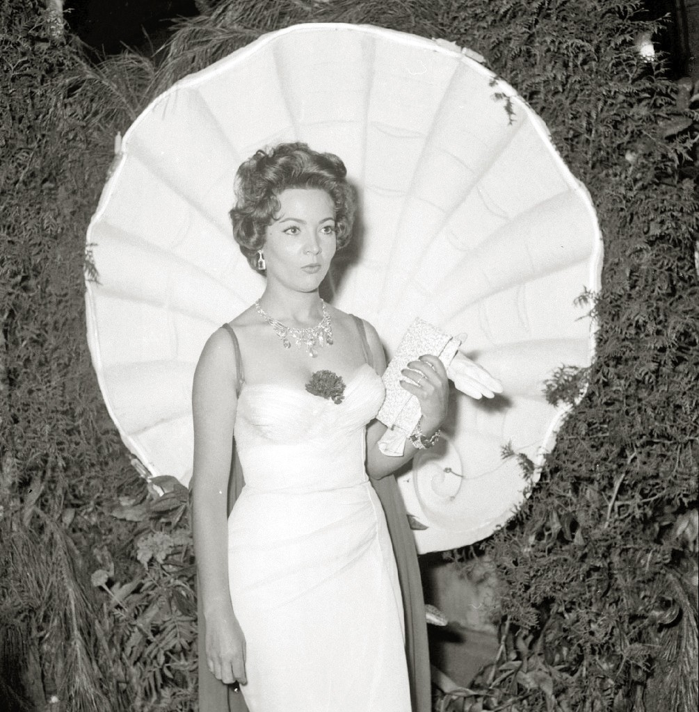 Título original: Festival de Cine de San Sebastián (46/110) Localización: San Sebastián (Guipúzcoa)